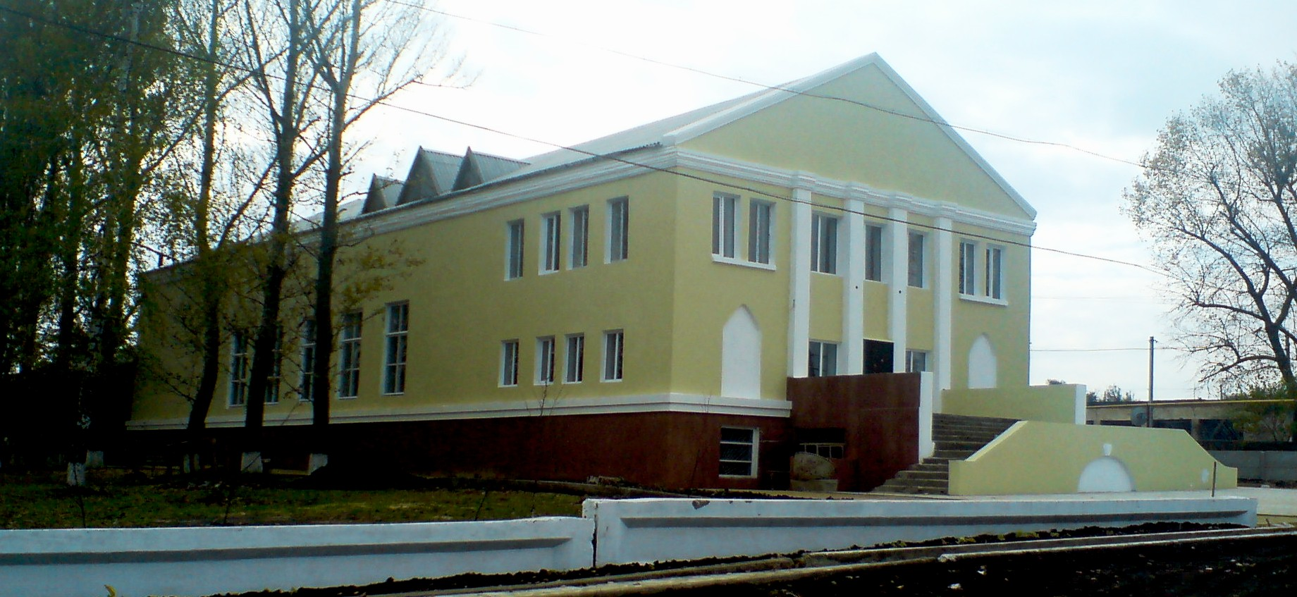 фото Дворца культуры в Затишье